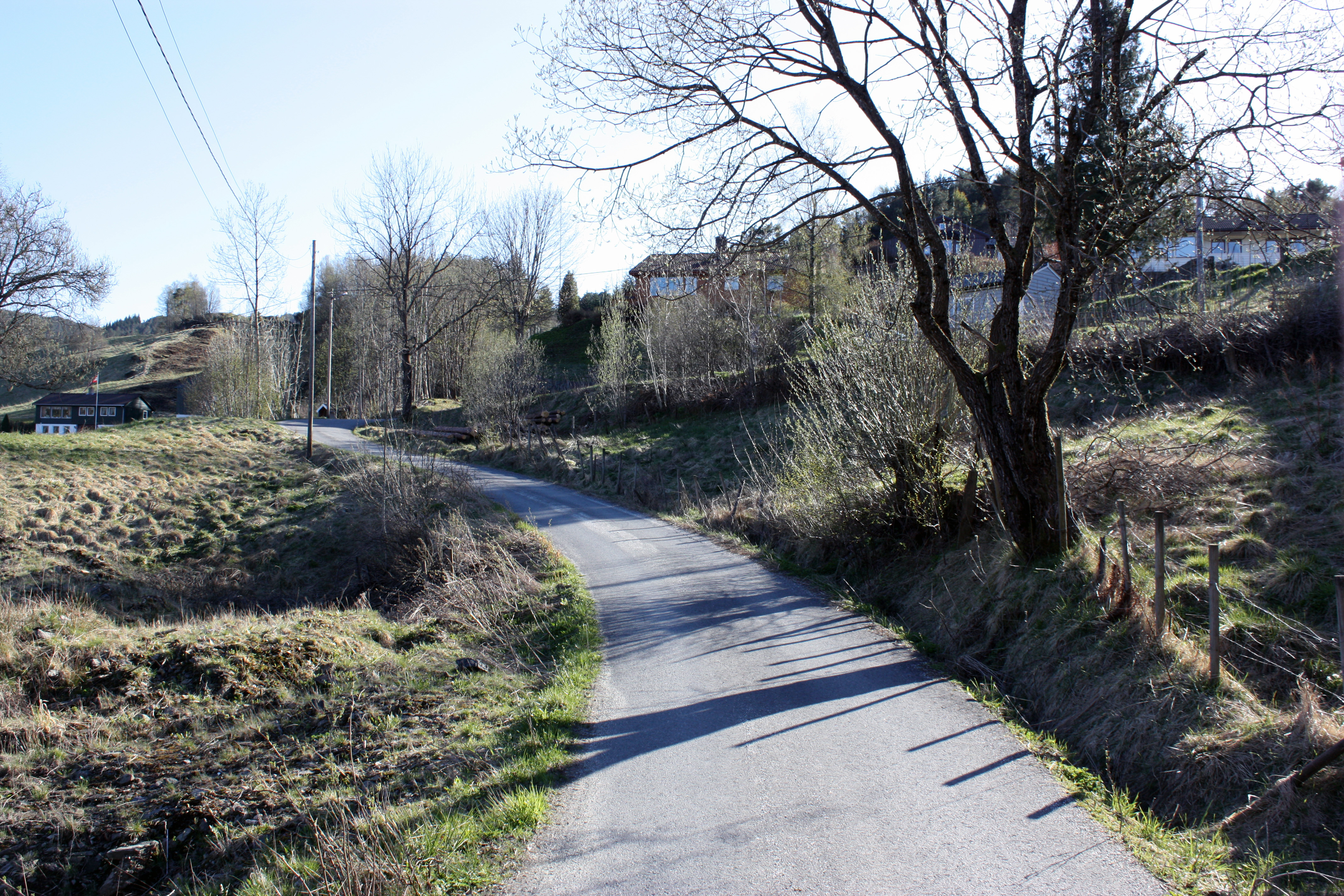 Bahustræet, Fana, Bergen, Norway